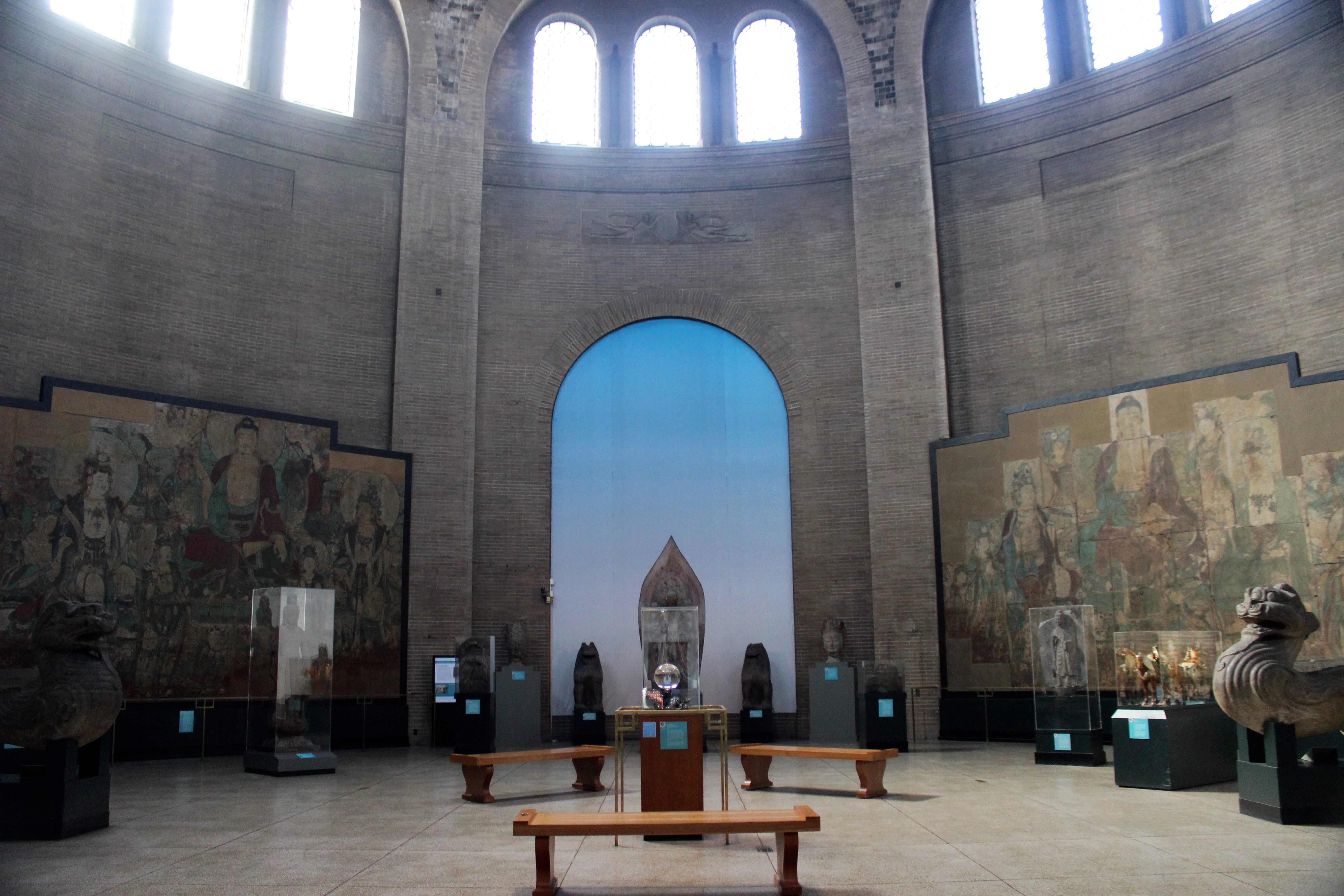 Penn University Museum, Philadelphia.